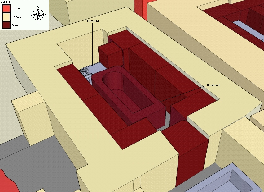 Vue en élévation du caveau d'Osorkon II et d'Hornakht son fils - Nécropole royale de Tanis